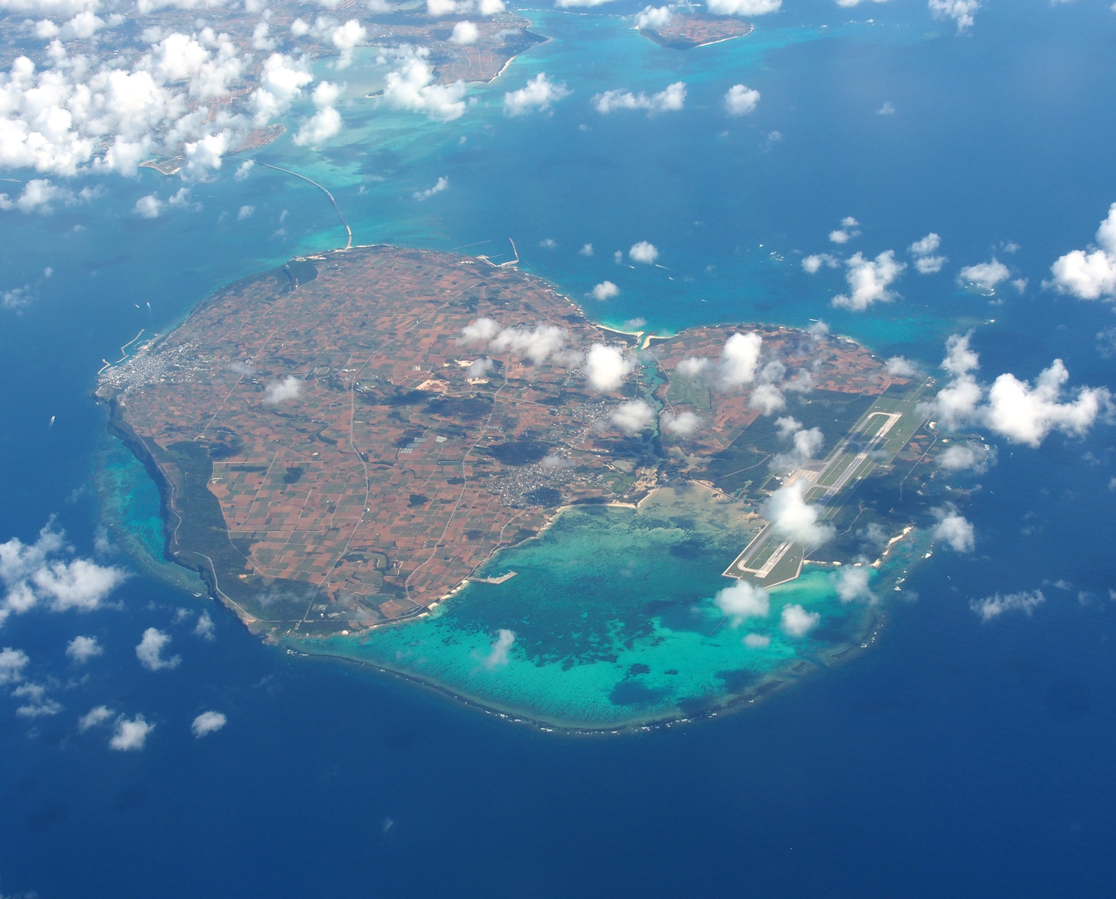 伊良部島と下地島（沖縄県宮古諸島）